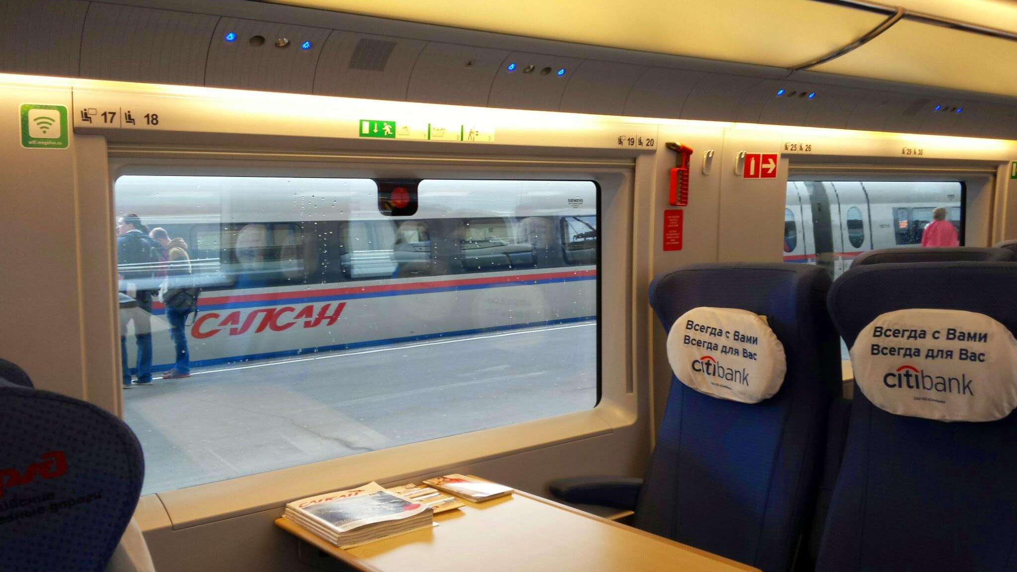 Столик в салоне электропоезда Сапсан